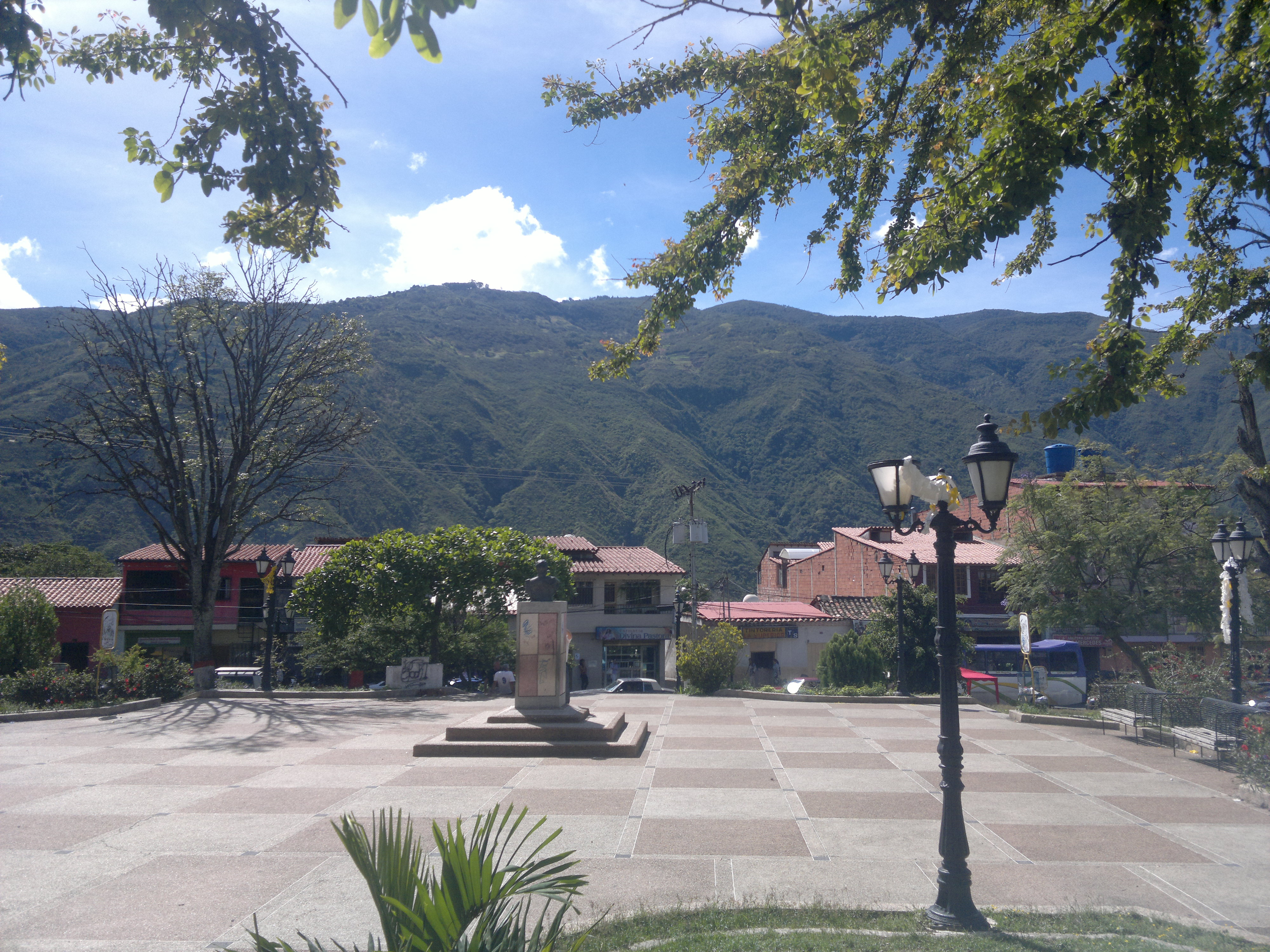 Caluroso día en el estado Mérida.